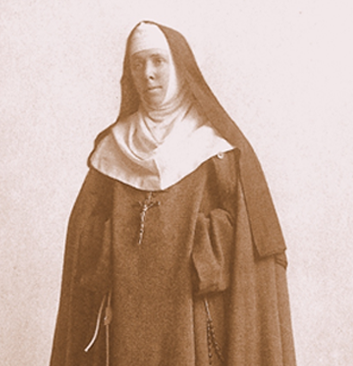 Photographie de la Mère Lurana White.